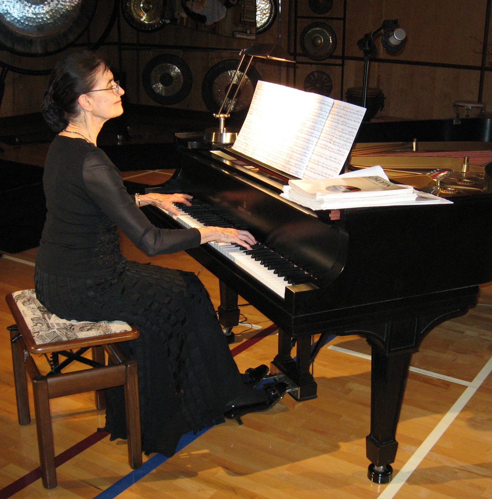 Pianist Elaine Keillor